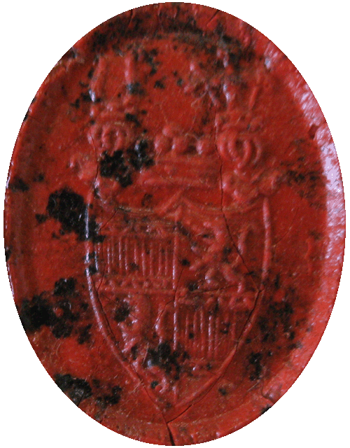 Bogyó Rudolf Nyitra vármegye szolgabírájának pecsétje 1844-ből (ŠA Nitra, NŽ, Nobilitaria, I/29 Bartha)